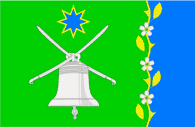 Флаг Новобейсугского сельского поселения, Краснодарский край, Россия.